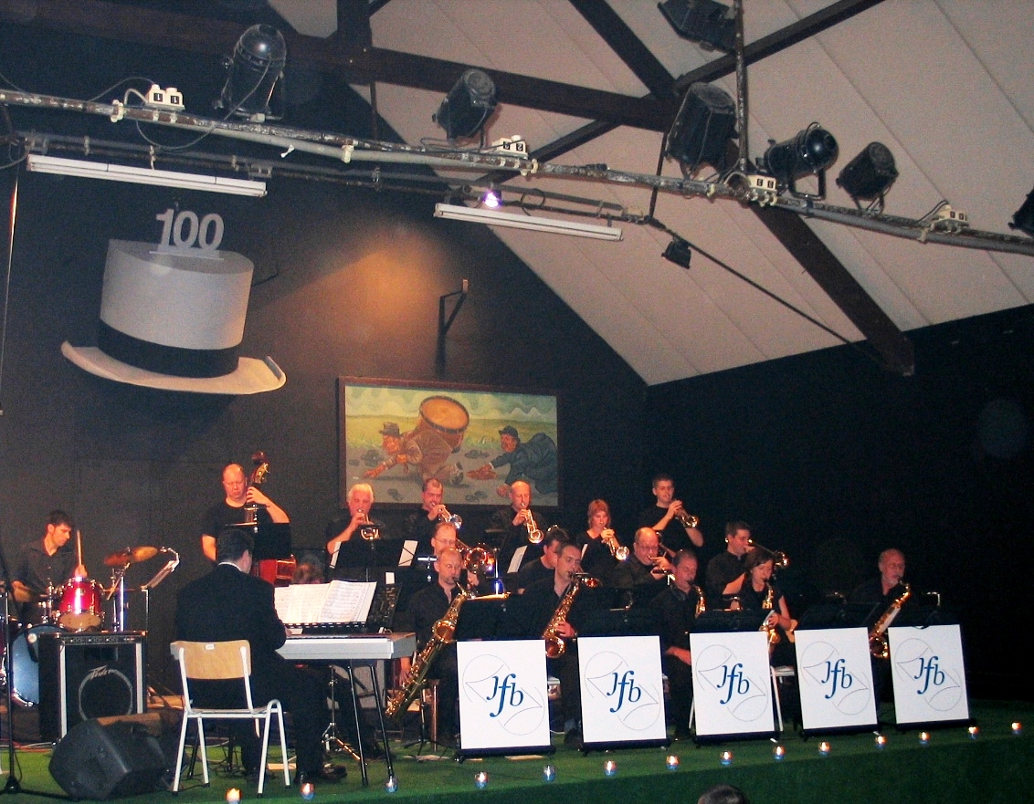 Jazzisfaction Big band uit Diest - eigen foto